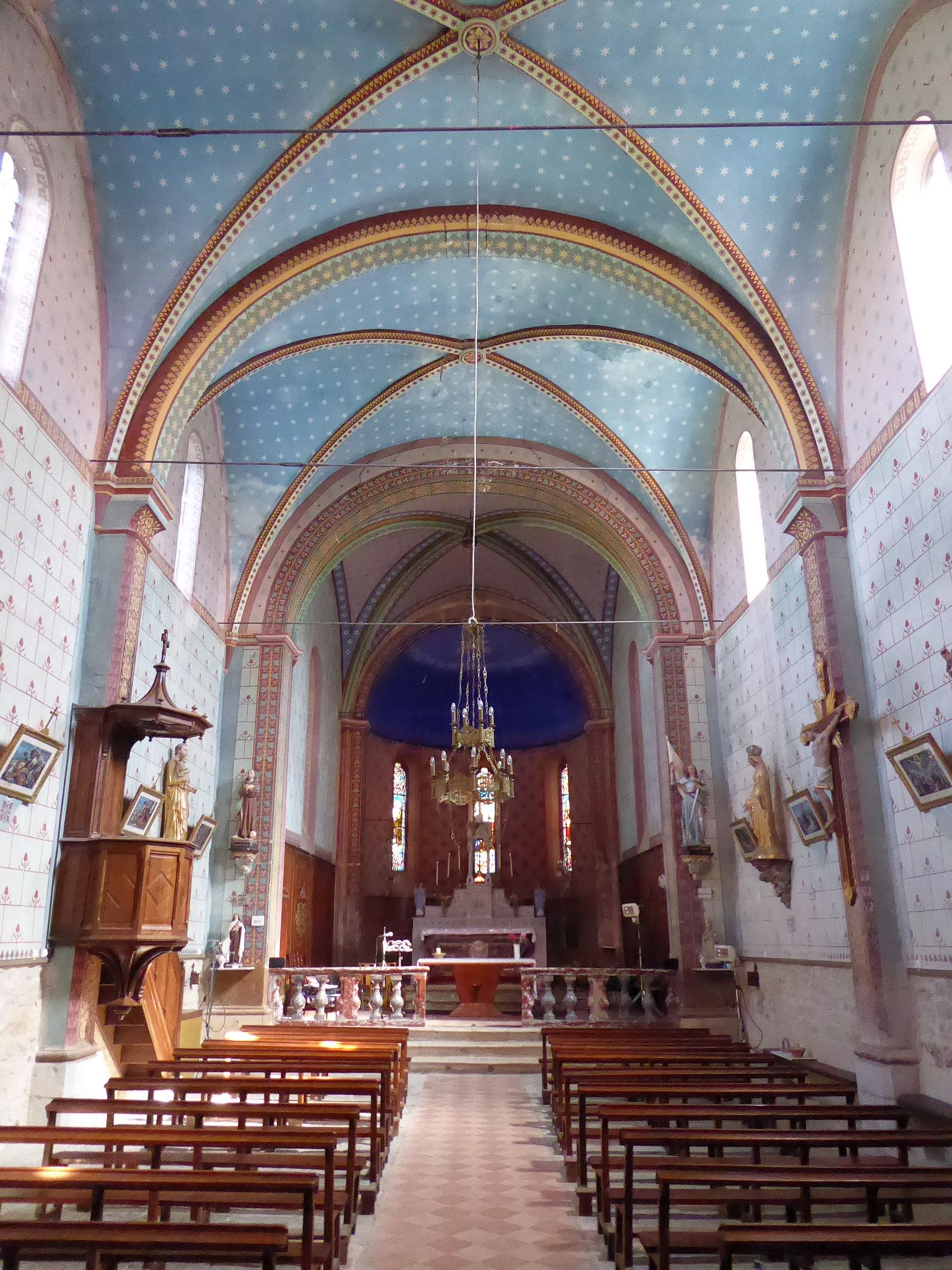 Église Saint-Étienne de Roquetaillade (Aude)